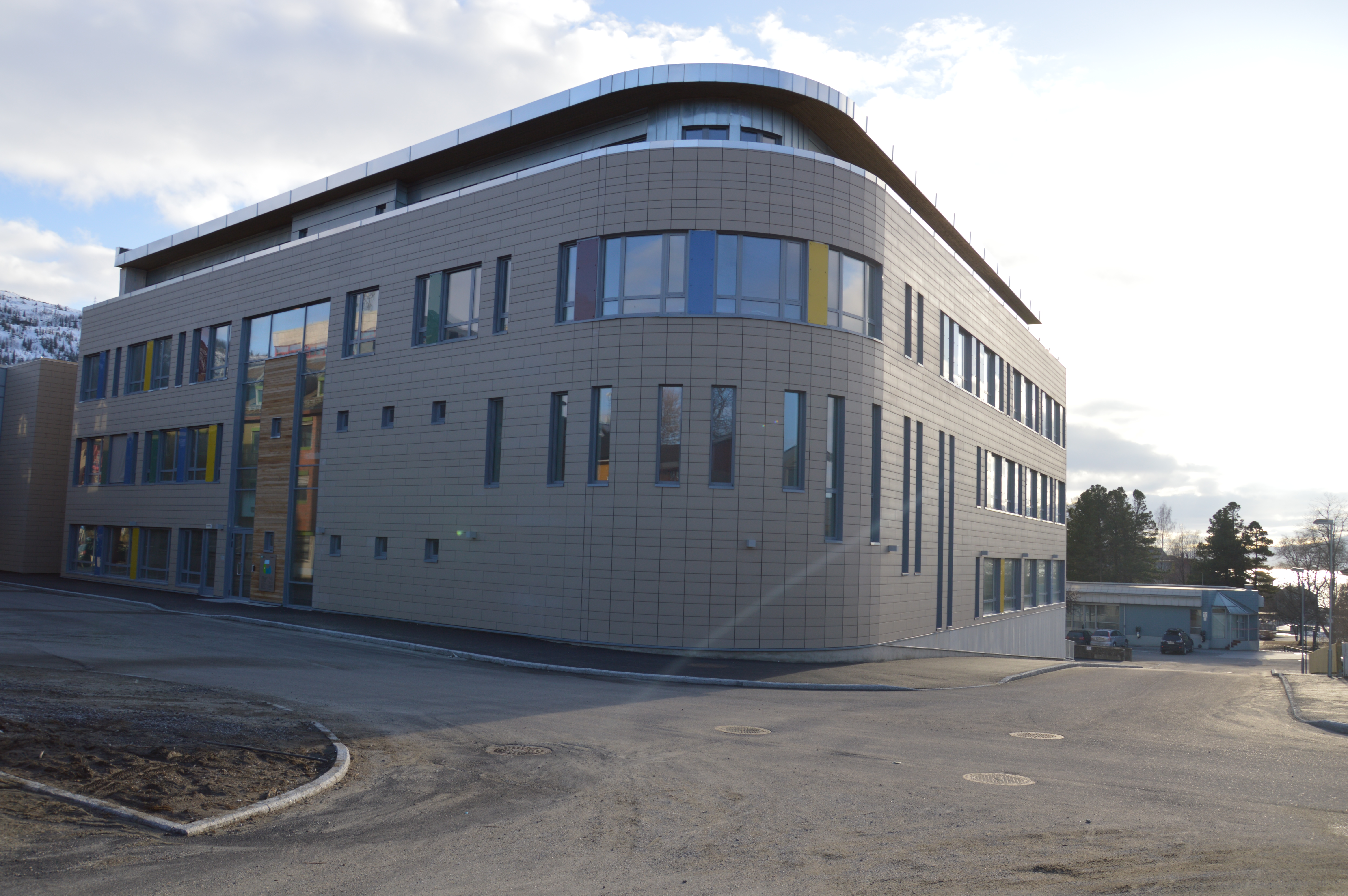 Campus Helgeland i Mo i Rana